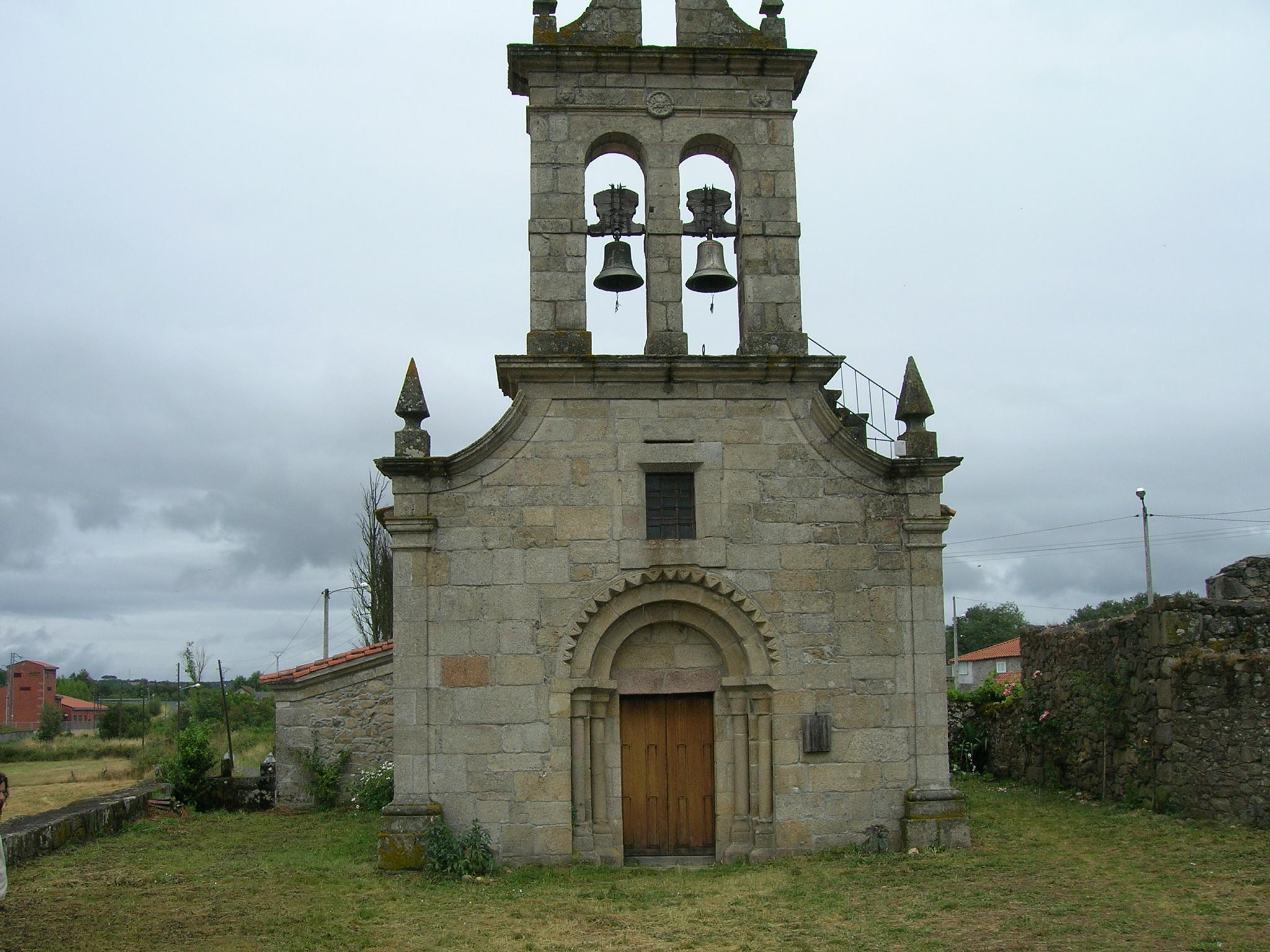 Igrexa de San Pedro de Canabal, Sober, Galiza